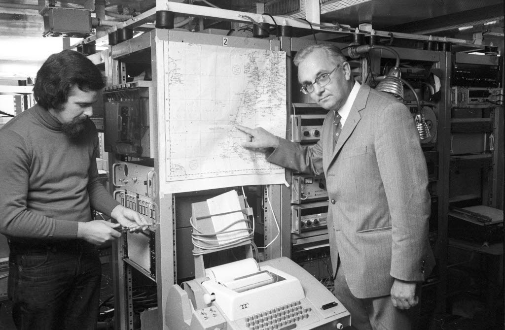 auf dem Forschungsschiff PLANET. Der Fahrtleiter Hans Hinzpeter (rechts) erläutert anhand einer Karte das Einsatzgebiet vor der Küste Westafrikas, während die stark beanspruchten Messgeräte bereits abgebaut werden. Die PLANET kehrte am 08.10.1974 von einer zweimonatigen Forschungsreise zur Erkundung des Wetters aus dem Atlantik zurück.